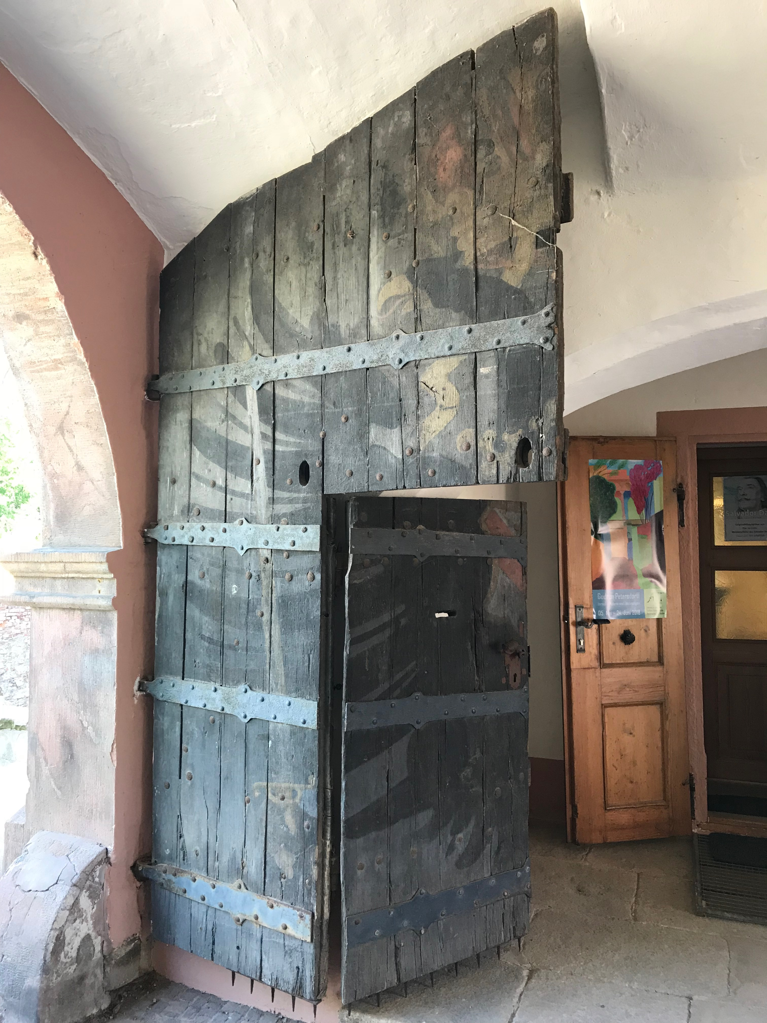 Schloss Forderglauchau, linker Torflügel